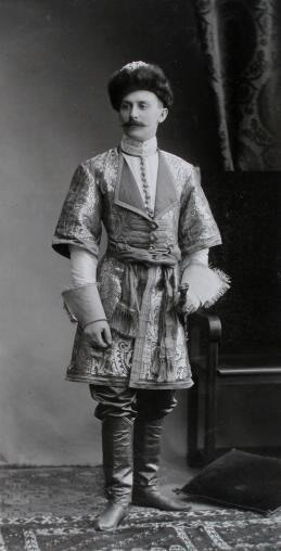 Корнет Кавалергардского императрицы Марии Федоровны полка И.М.Миклашевский в наряде стрельца Стремянного приказа времен царя Алексея Михайловича